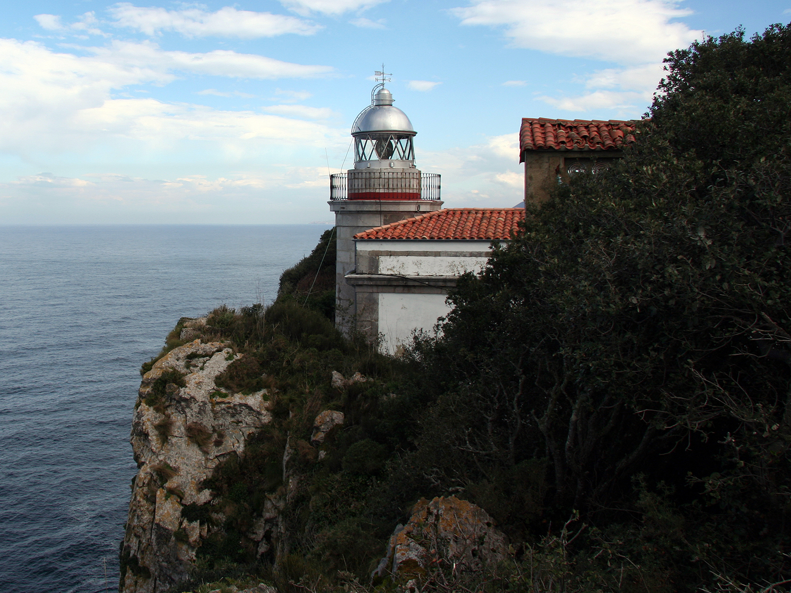 Faro de San Emeterio Autor: Ramón Noriega